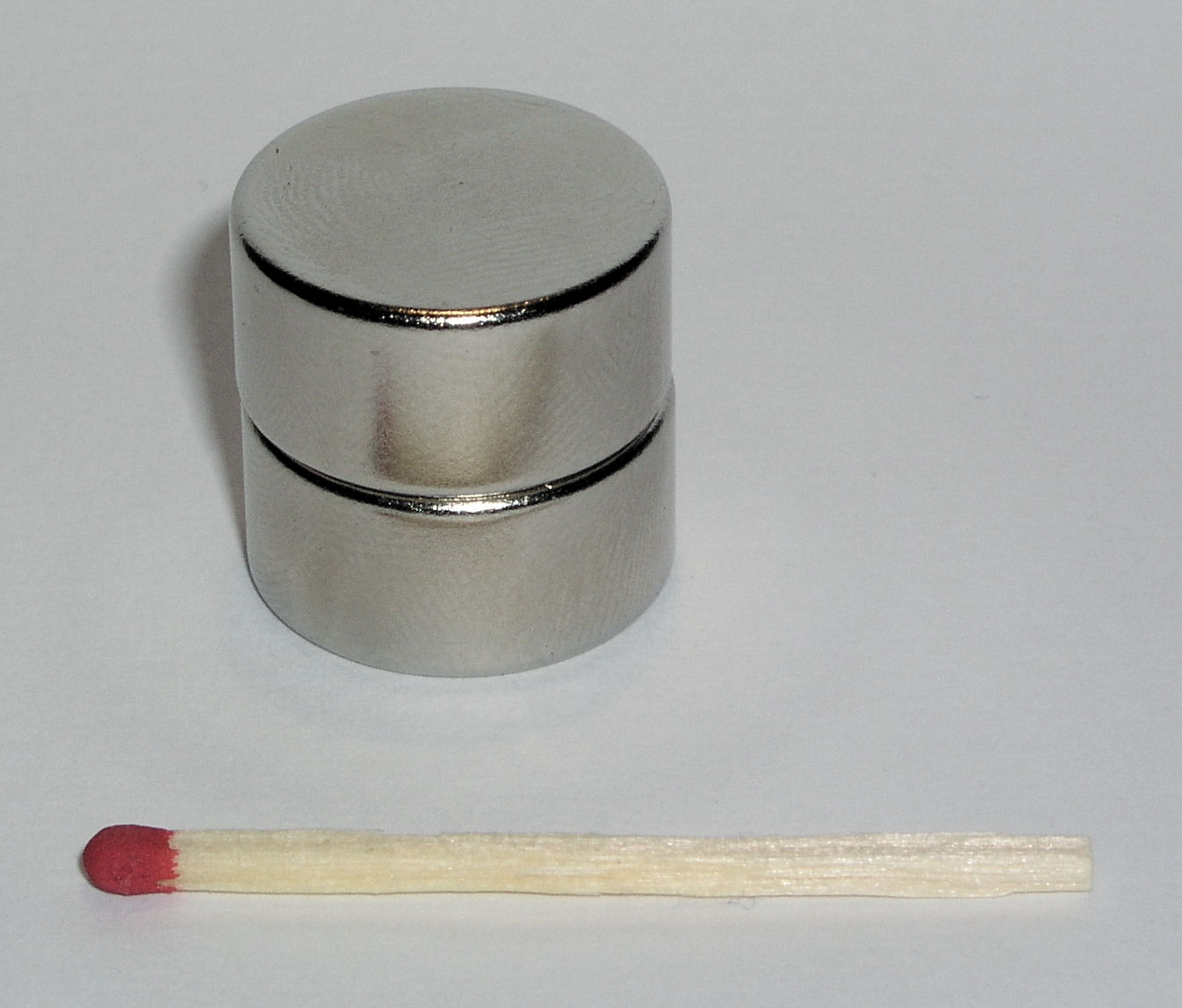 Beschreibung: Zwei NdFeB-Magnete (20x10mm) Quelle: "selbst fotografiert" am 20.3.06